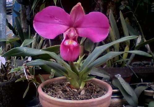 Phragmipedium peruvianum - Phragmipedium kovachii